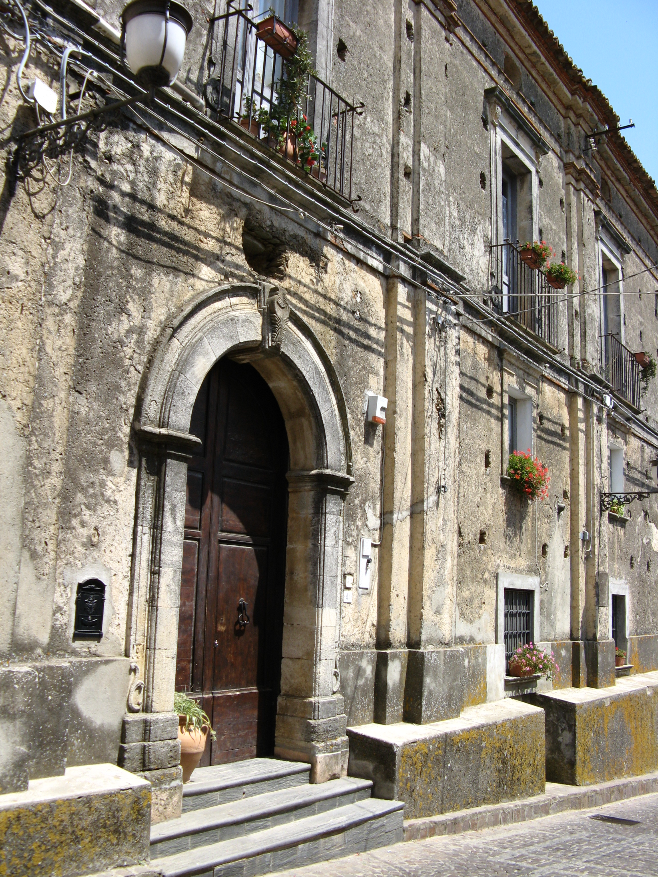 Motta Santa Lucia: Scorcio del centro storico